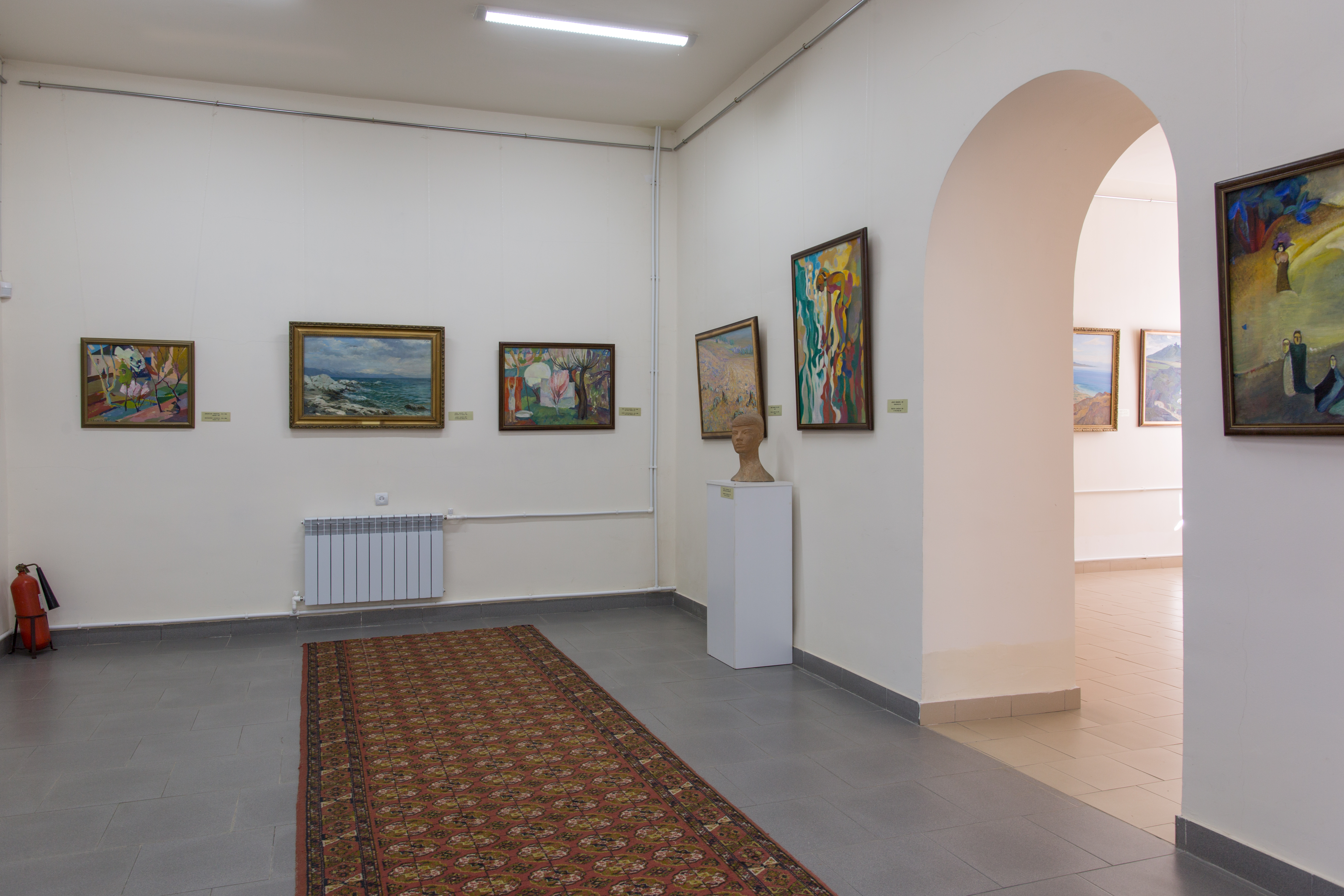 Ջերմուկի պատկերասրահի ցուցասրահներից մեկը, որտեղ ցուցադրվում են հայ գեղանկարիչների նկարներ և քանդակներ։